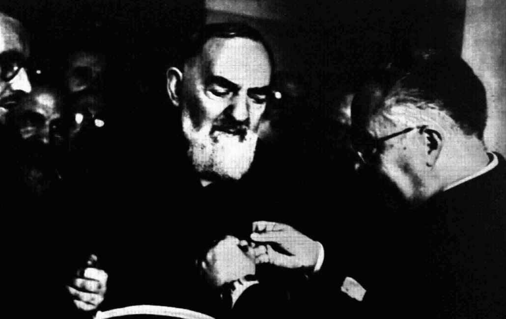 Italian priest Pio of Pietrelcina receives a "Stellina D'oro", a decoration from Sorella Radio. San Giovanni Rotondo, June 1964